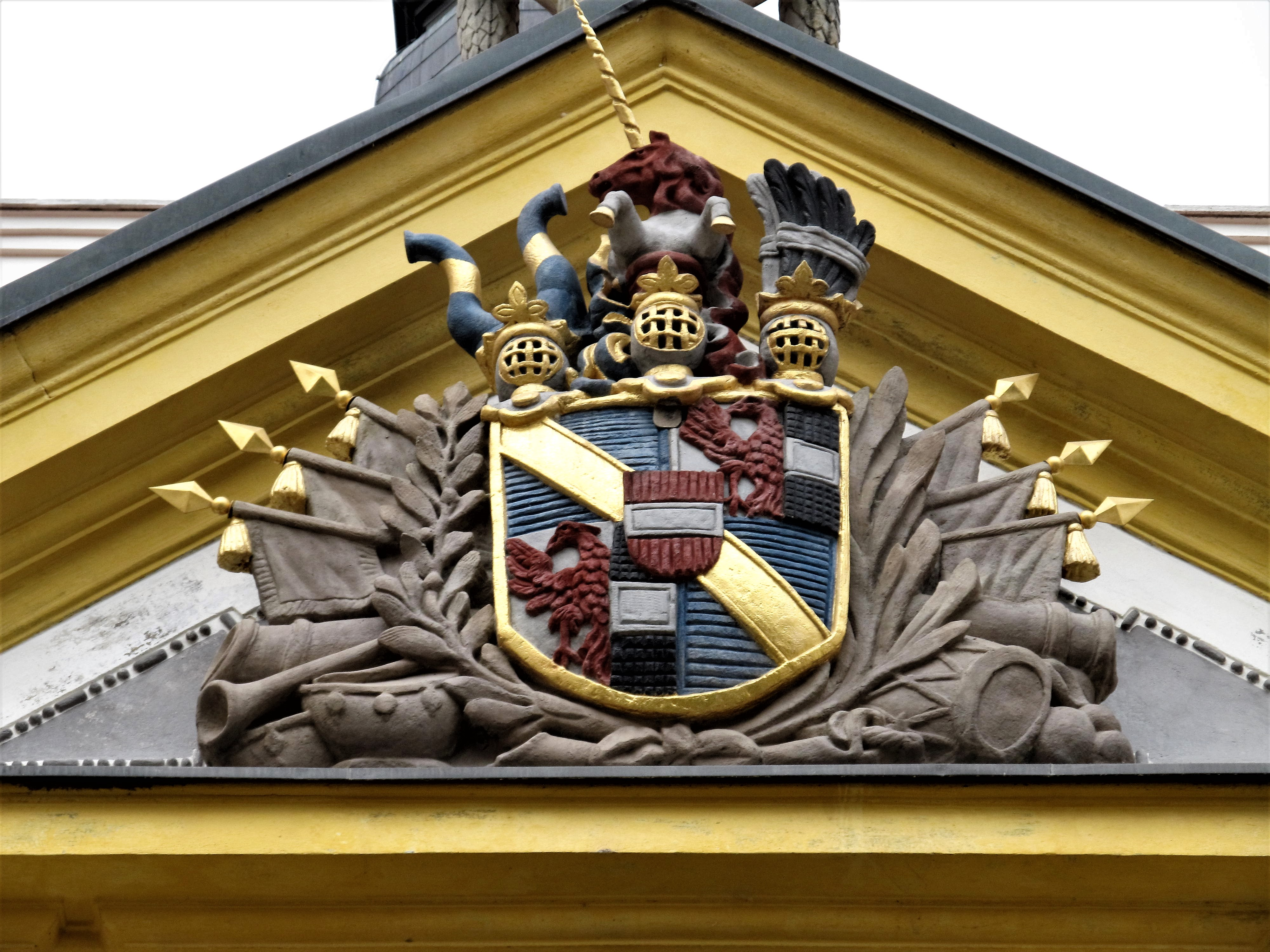 Erb rodu Thun-Hohensteinů nad hlavním vstupem do zámku v Děčíně